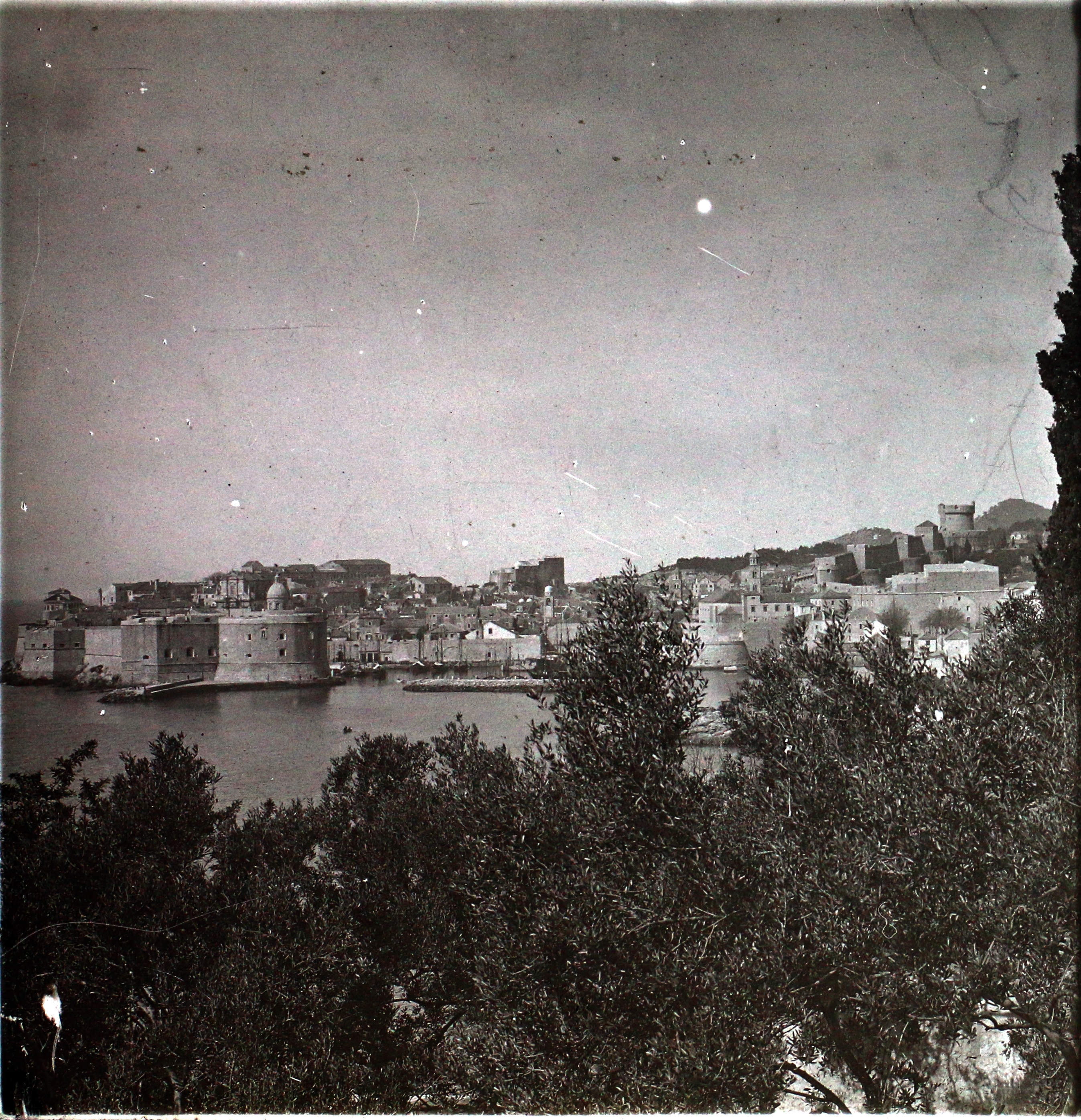 a város látképe kelet felől. Location: Croatia, Dubrovnik Title: a város látképe kelet felől.